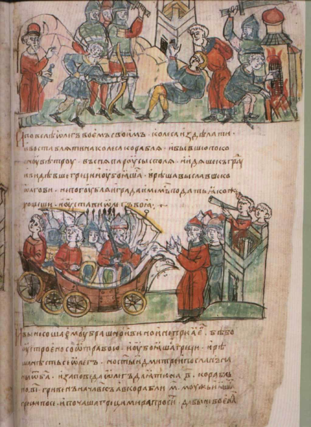 Radzivill chronicle. List 15, front. Вещий Олег под стенами Царьграда.